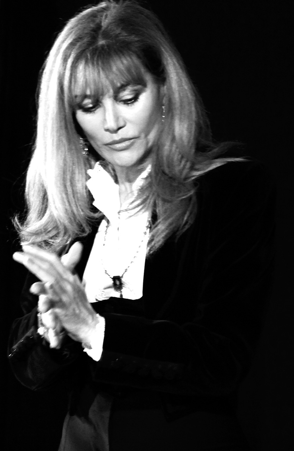 Corinne Sauvage sur la scène de l'Olympia Paris avec Manolo et El Chato